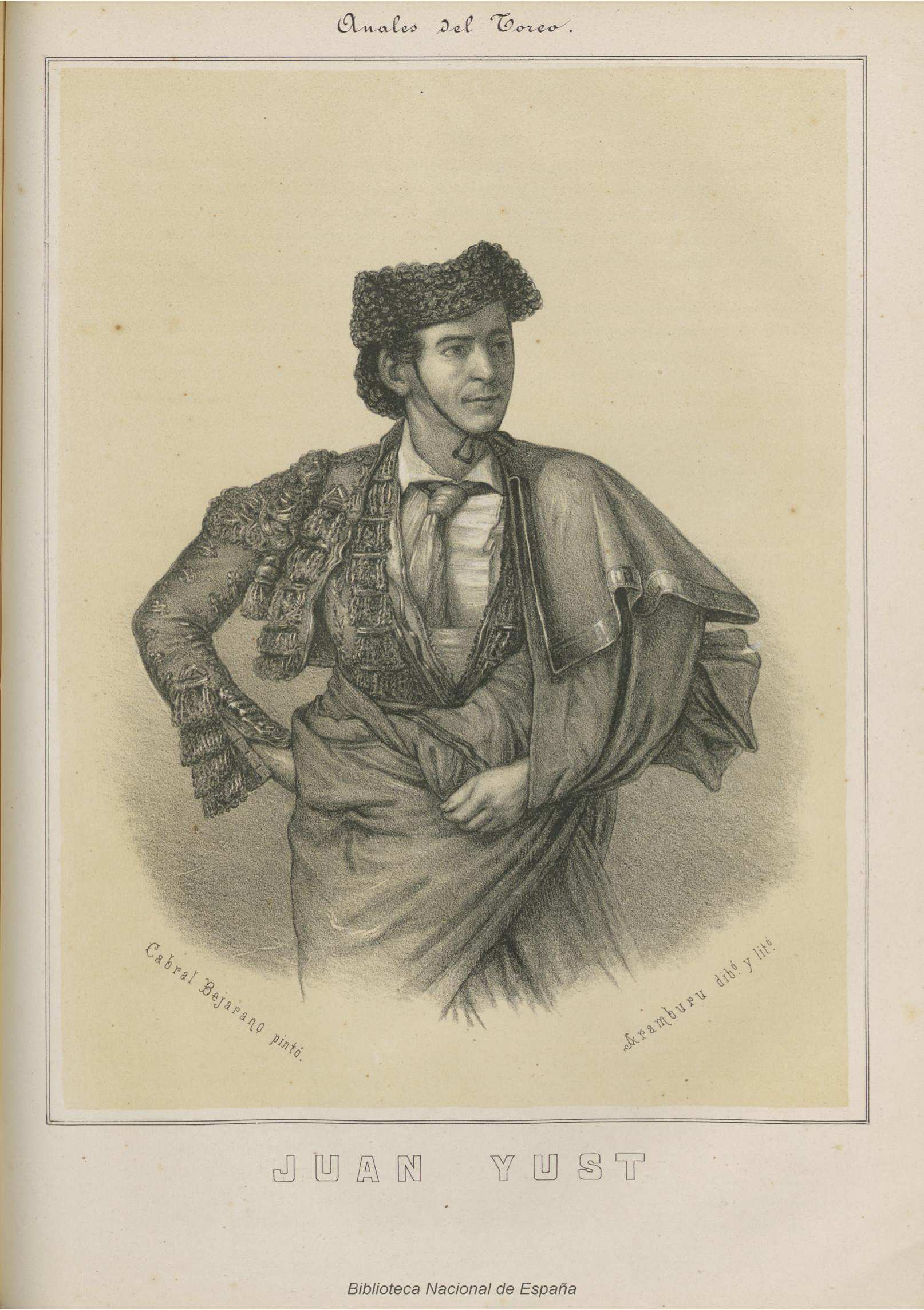 Juan Yust, litografía de Arámburu por pintura de Cabral Bejarano. Ilustración de Anales del toreo: reseña histórica de la lidia de reses bravas: galería biográfica de los principales lidiadores: razón de las primeras ganaderías españolas, sus condiciones y divisas obra escrita por José Velázquez y Sánchez; e ilustrada por reputados artistas, Madrid, 1888.